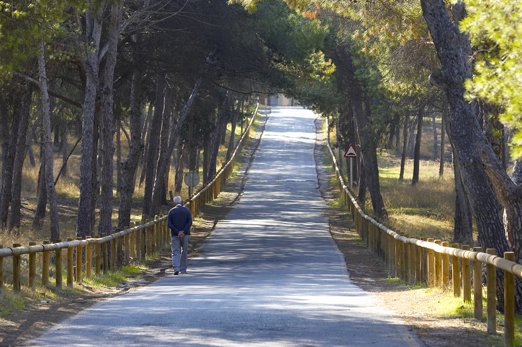 La Pinada